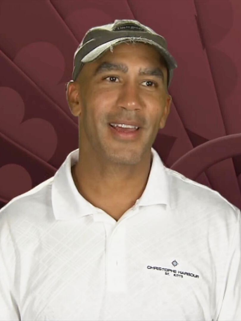 Bill Perkins beim WPT Alpha8